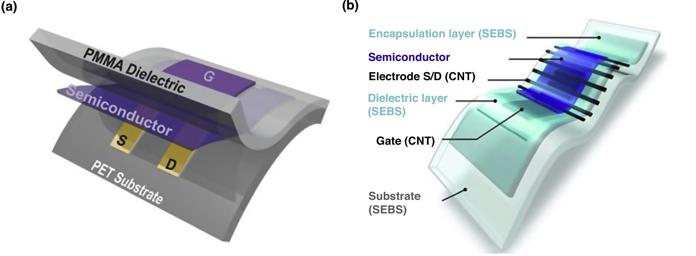 Painduvelektroonika transistorid